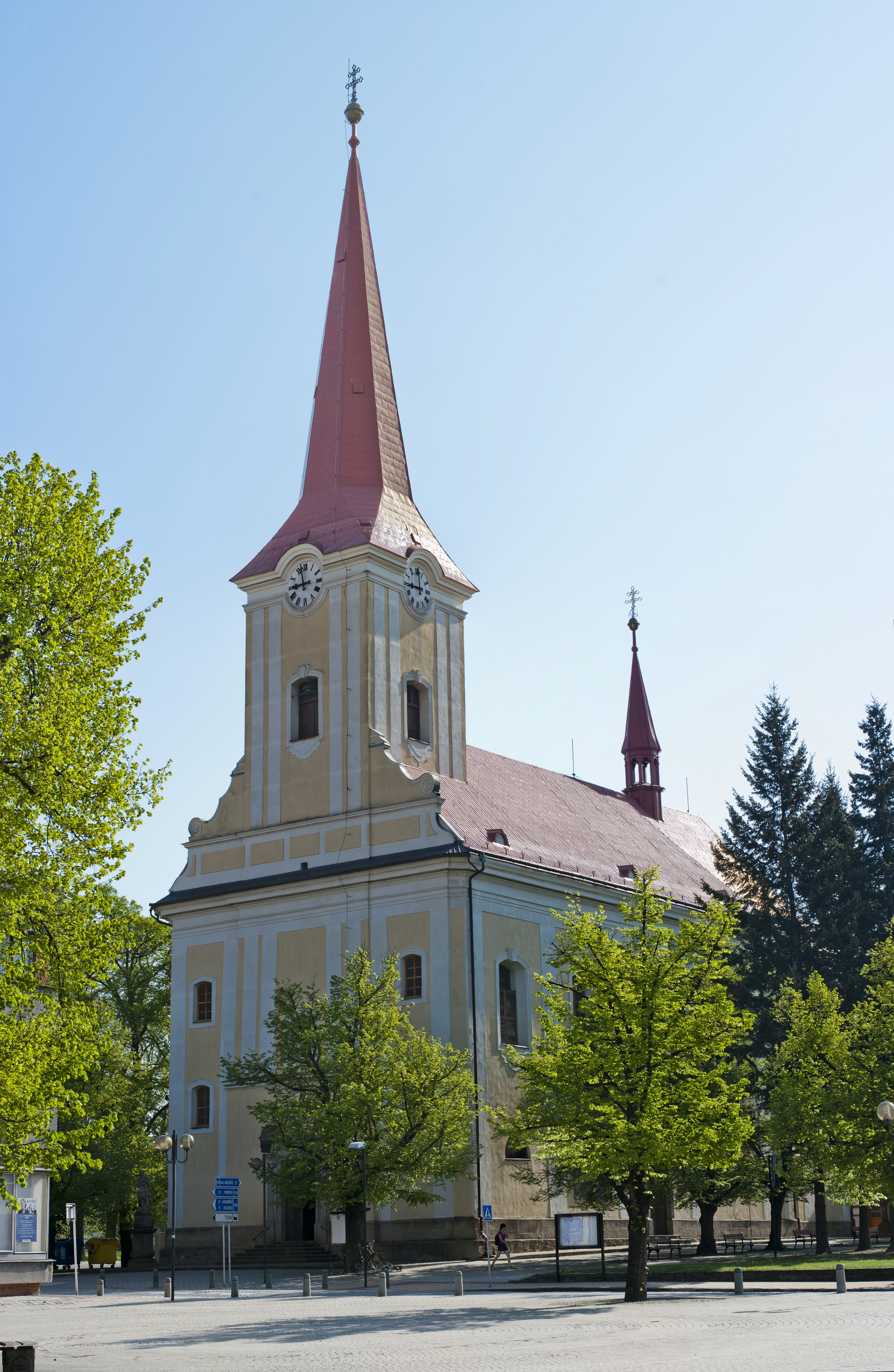 Kostel Sv. Jiljí